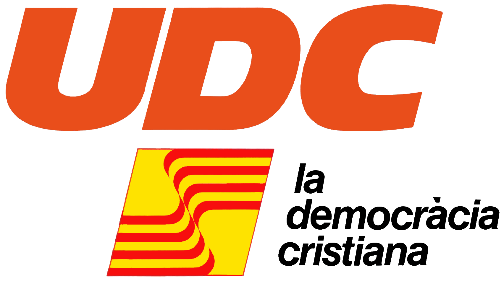 Emblema de Unio Democratica de Catalunya en 1977.